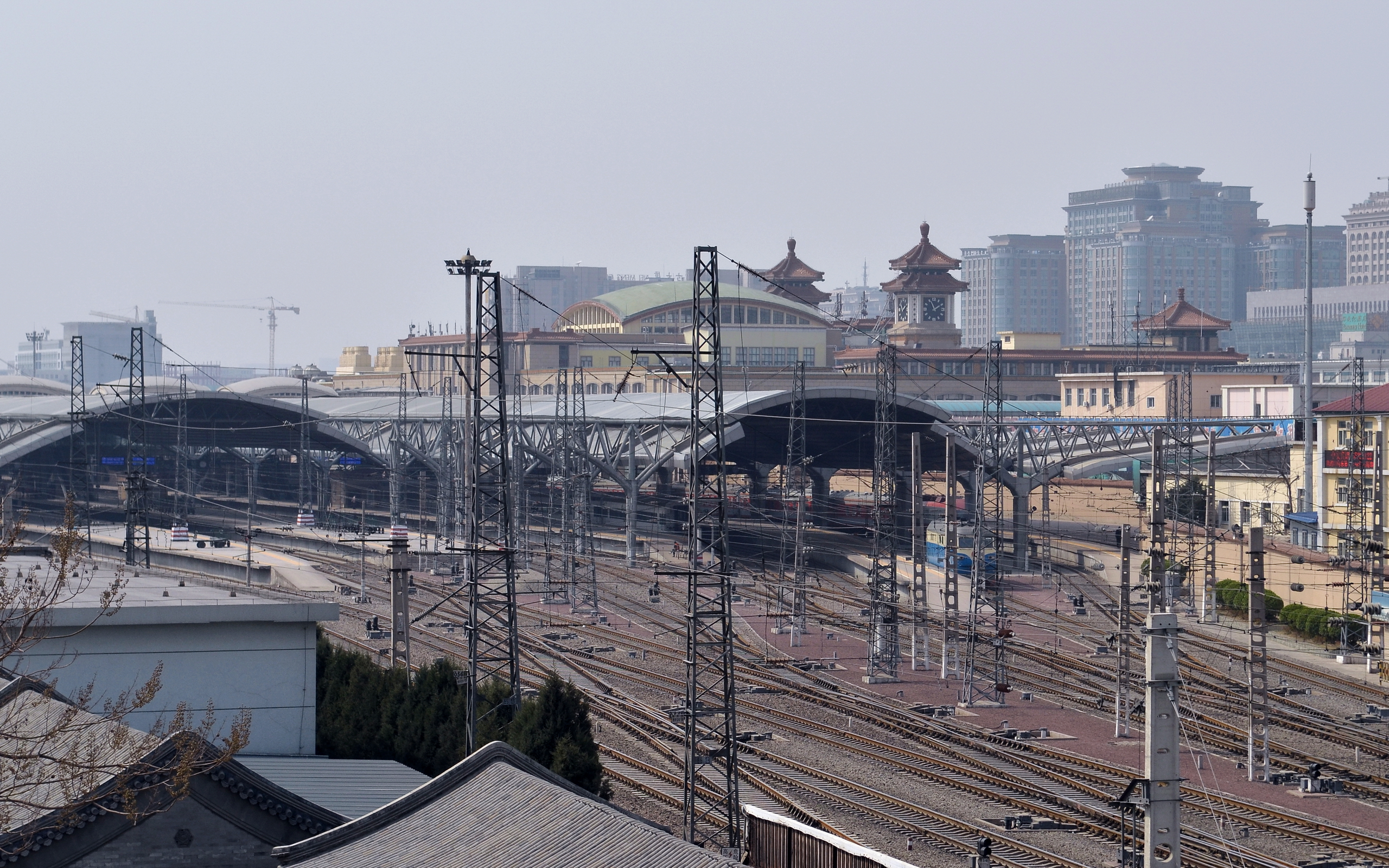 中文（中国大陆）: 由东便门城楼上眺望北京站